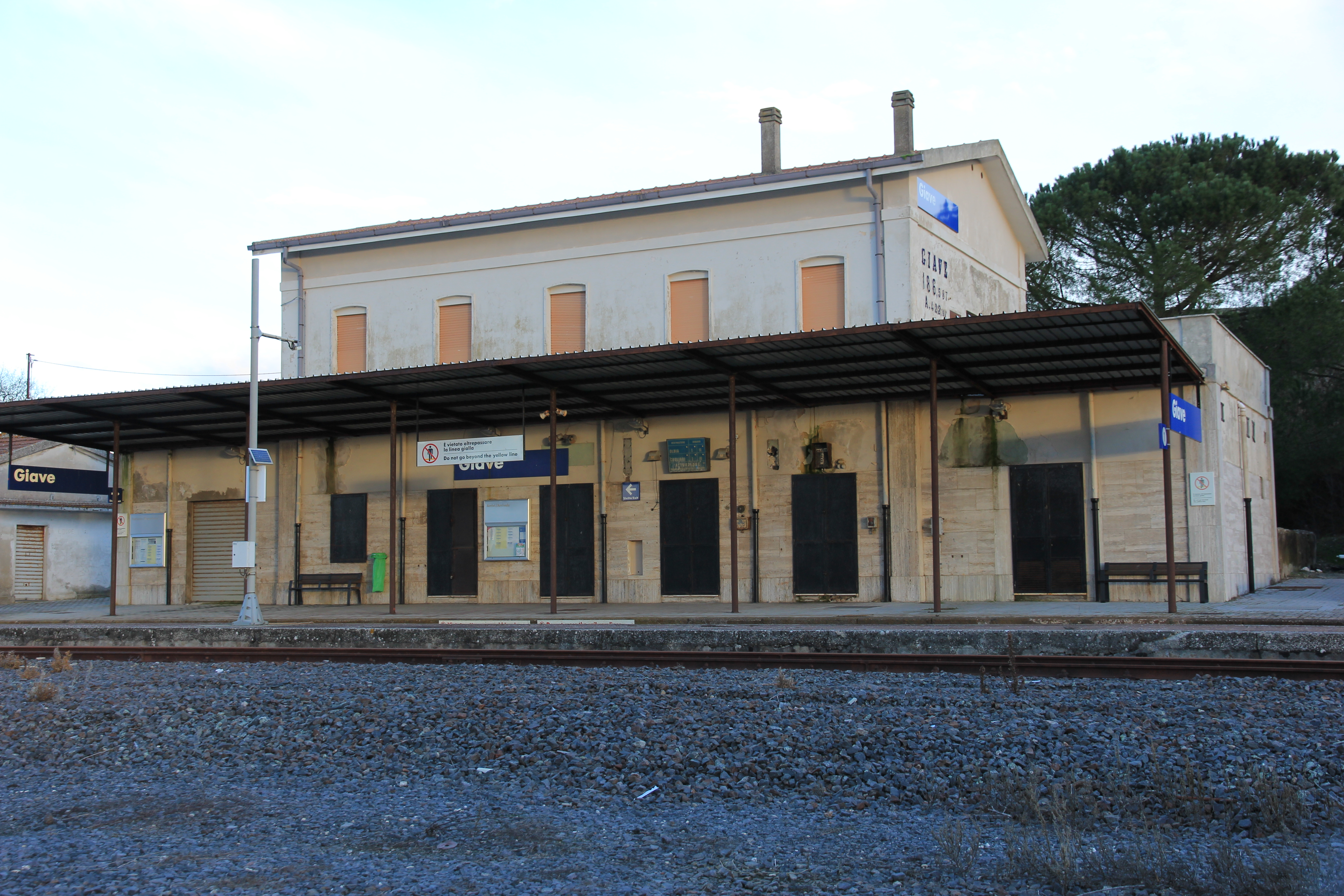 Giave - Stazione ferroviaria